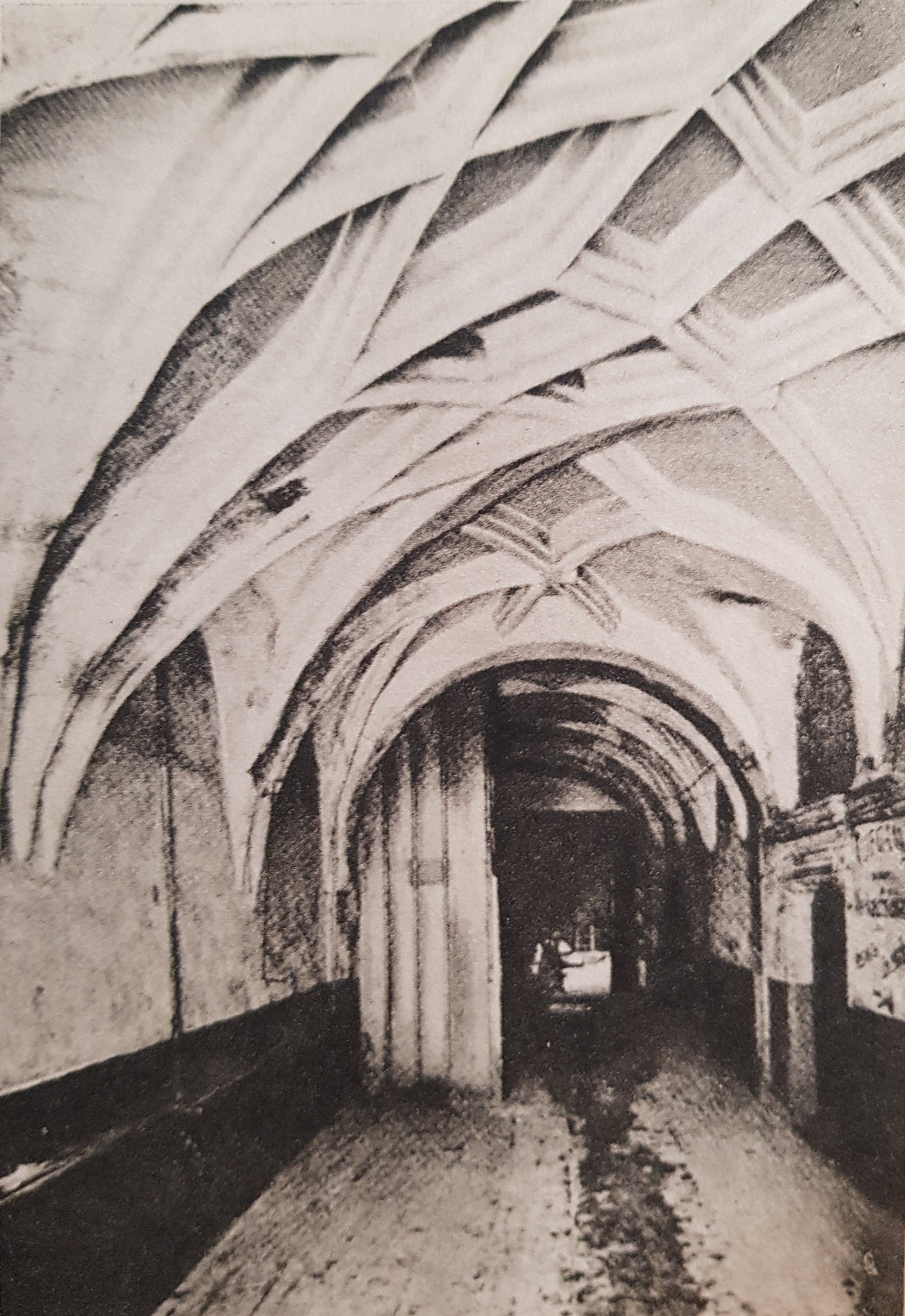 Późnogotyckie sklepienie w sieni kamienicy nr 39 na wrocławskim Rynku. (przed 1905)